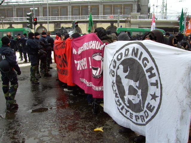 Anti-fascist blockade in Dresden Bahnhof Neustadt/Hansastraße